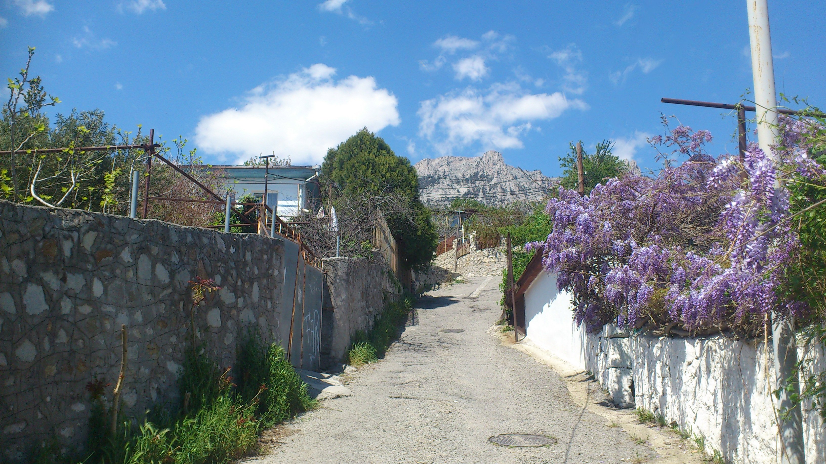 Улица Кузериных, Алупка. Названа в честь брата и сестры Михаила и Люси Кузериных, советских патриотов-подпольщиков, погибших в годы Великой Отечественной войны в 1942 году. Справа - дом, где вырос дважды Герой Советского Союза Амет-Хан Султан.